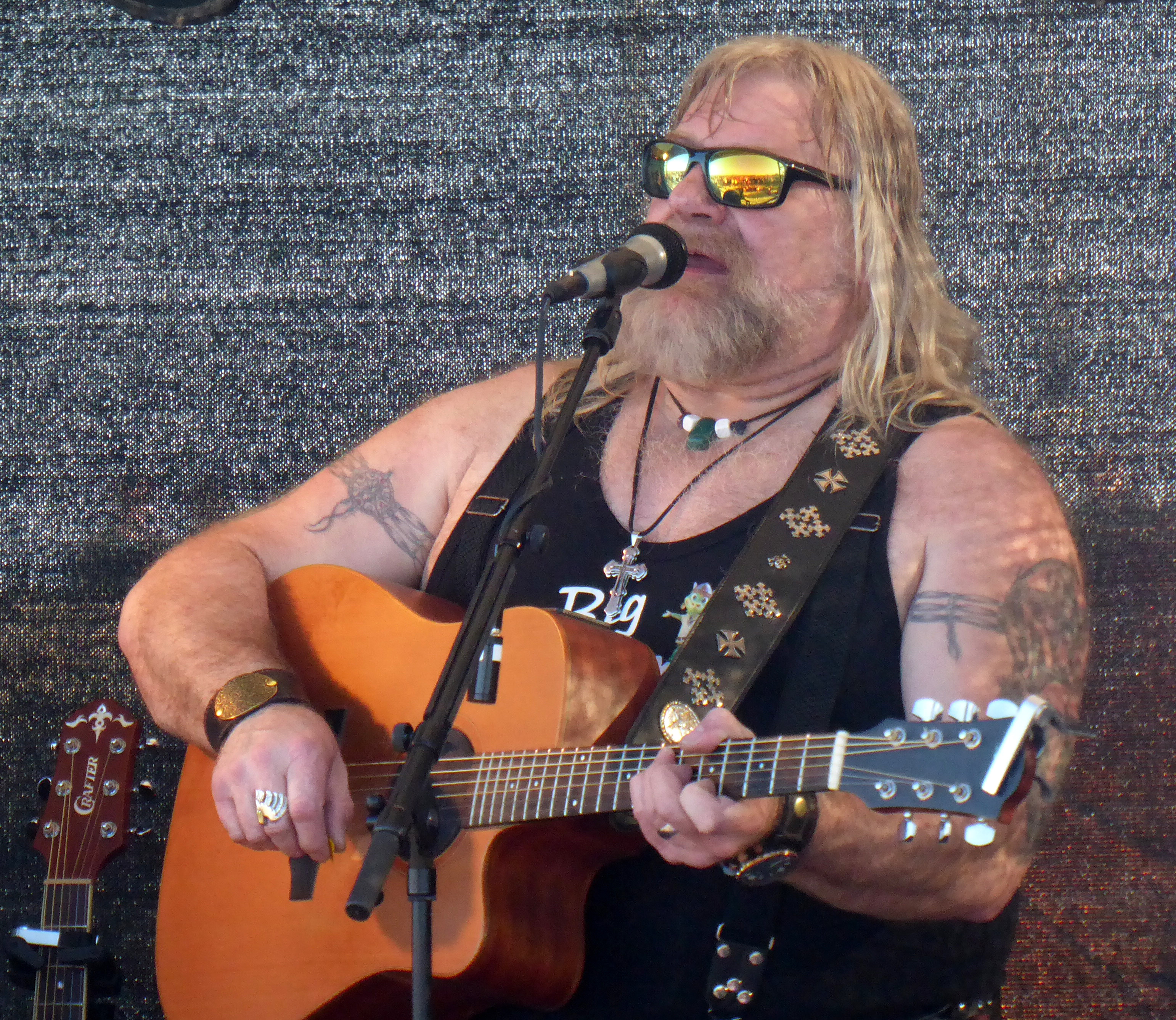 Harry Schmidt - Big Harry - beim Auftritt zum Osterfeuer 2019 in Damp